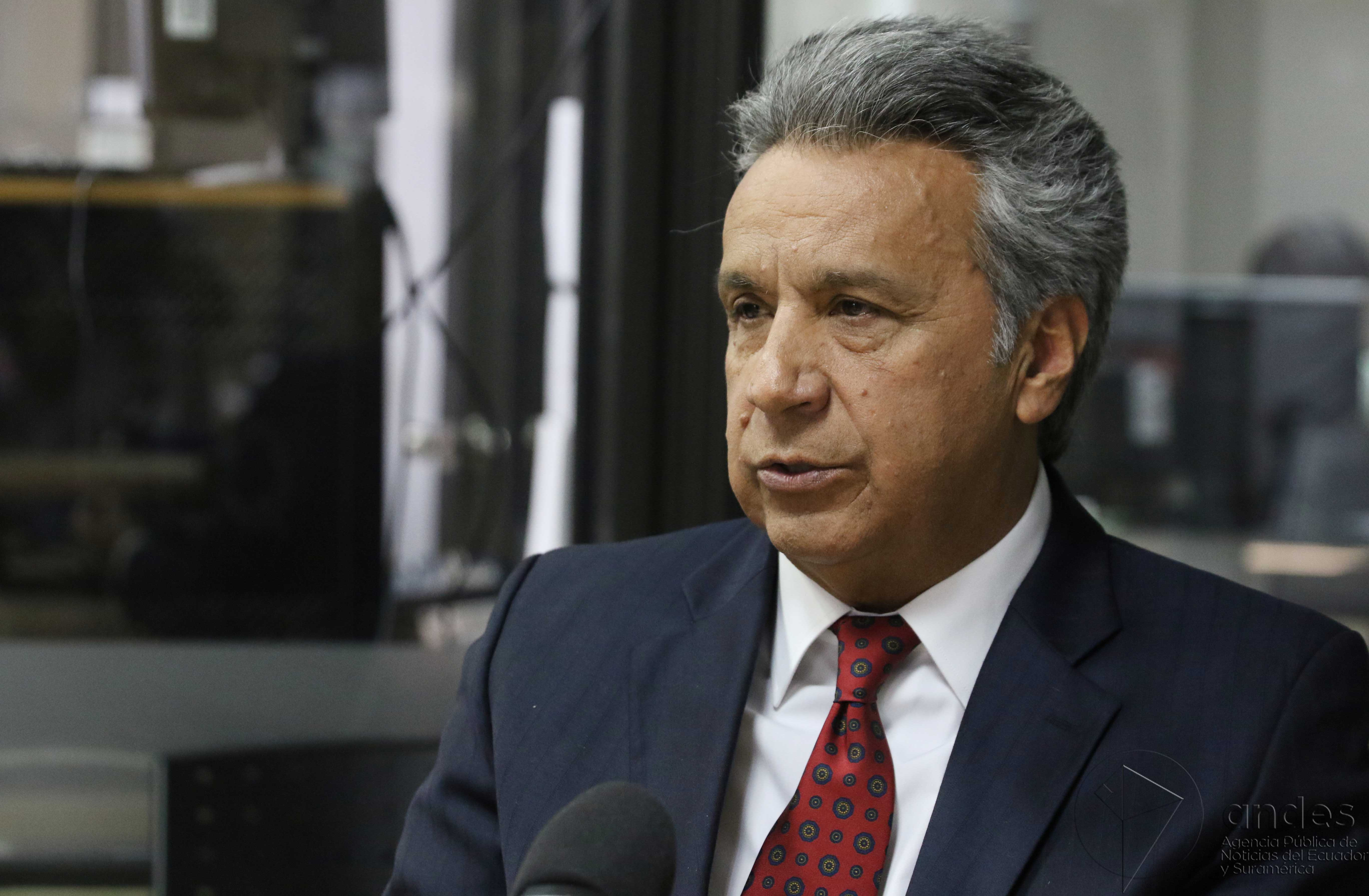 Quito, 03 oct (Andes).- Lenin Moreno candidato a la Presidencia de la República por parte de Alianza PAIS. ANDES/Micaela Ayala V.